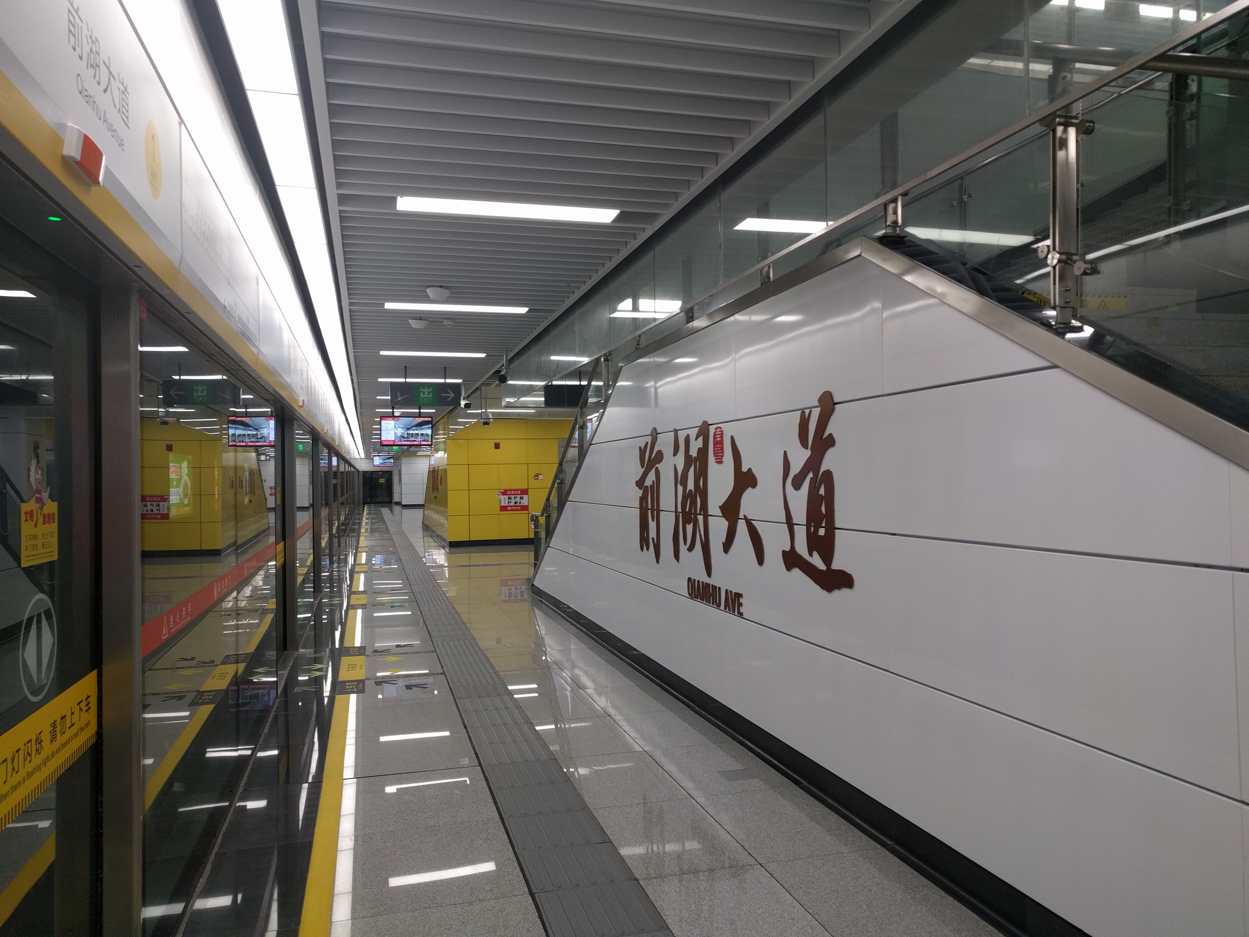 前湖大道站字壁